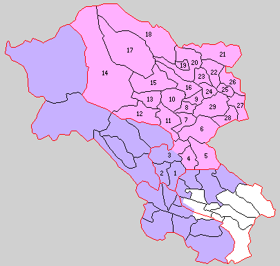 宮城県栗原郡の町村。